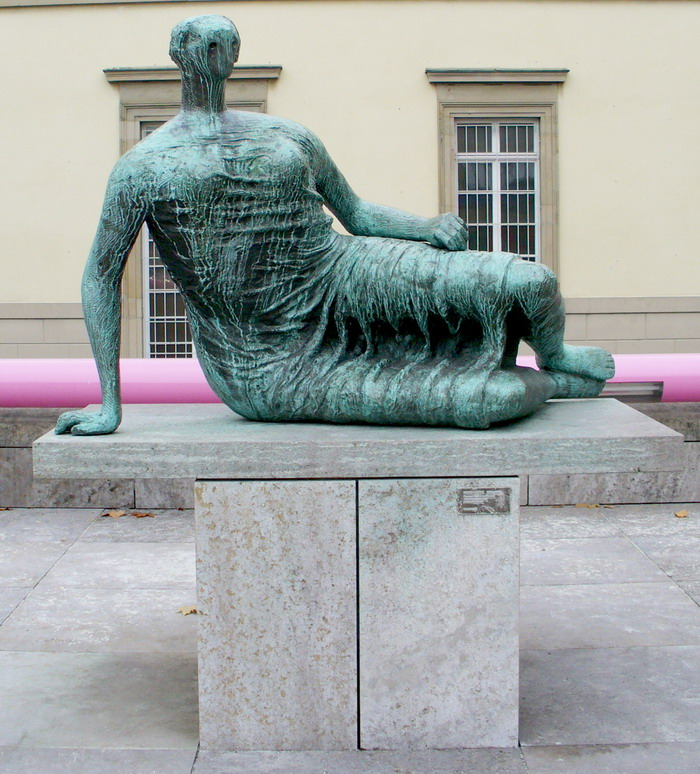 Stuttgart, Neue Staatsgalerie, Henry Moore: Die Liegende, 1961